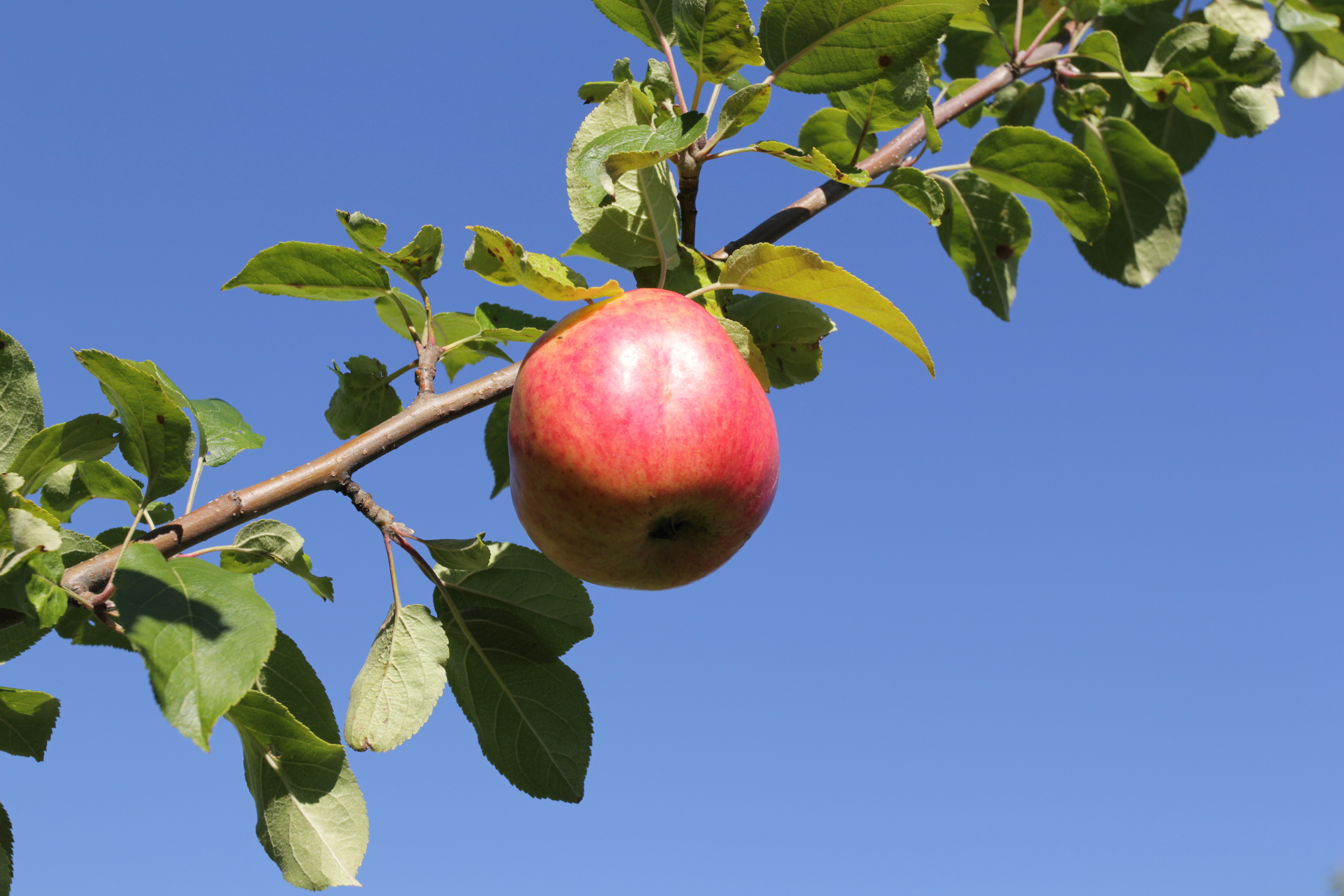 Gubbäpple i Gamla Stabergs äppel- och pärongård i barockträdgården.